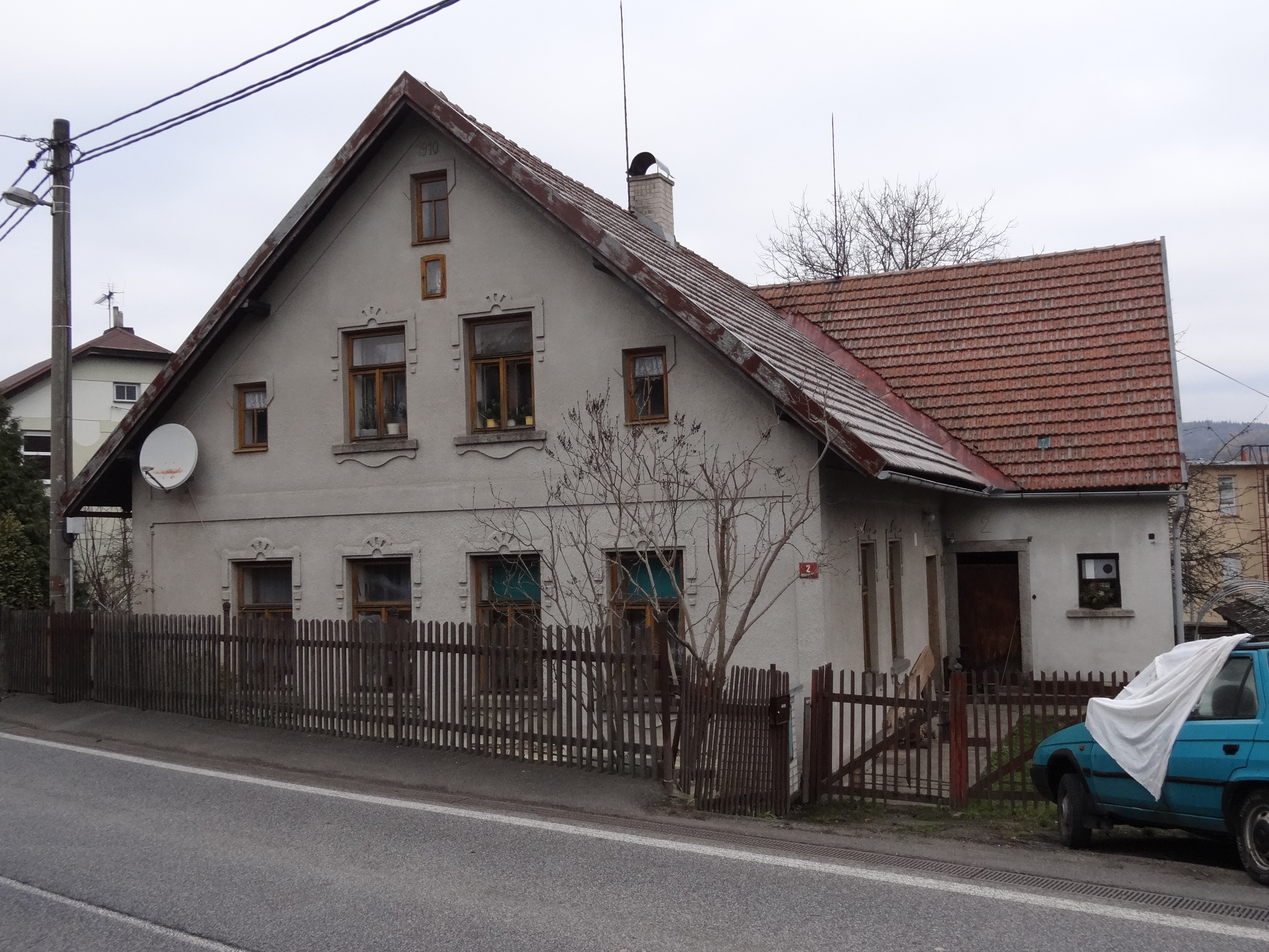 Pelechov (u Železného Brodu) - chalupa čp. 2